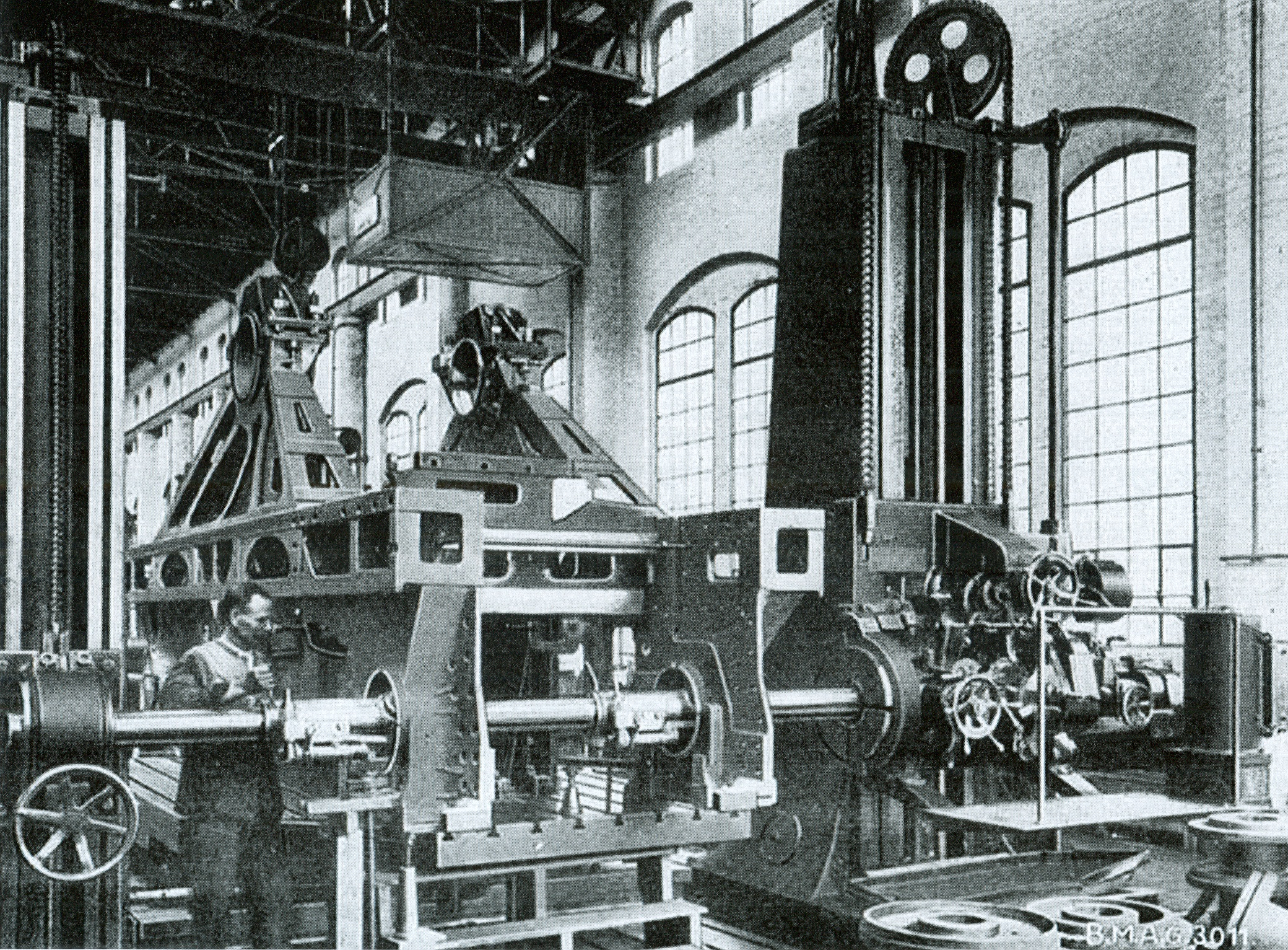 Werkfotografie der BMAG von der Fertigung des Motortragrahmens der EP 247